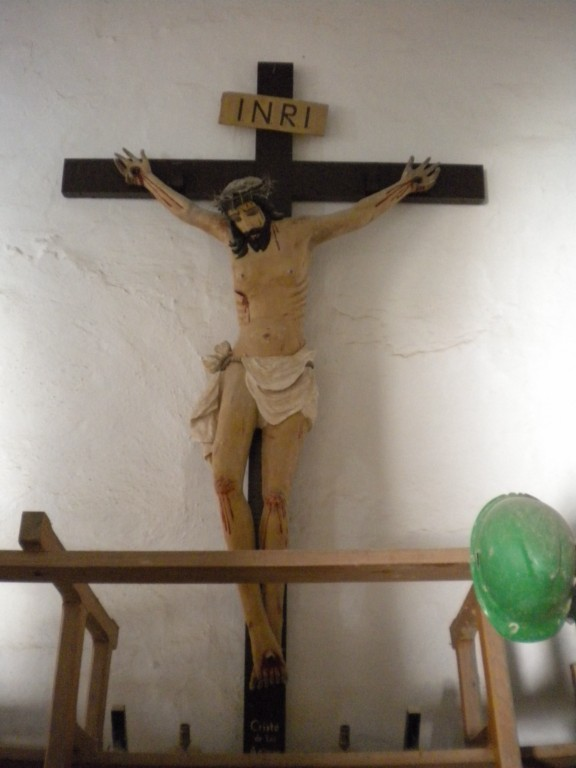 Cristo de la Aguas, ermita de San Antón del Valle de Sanlúcar de Barrameda